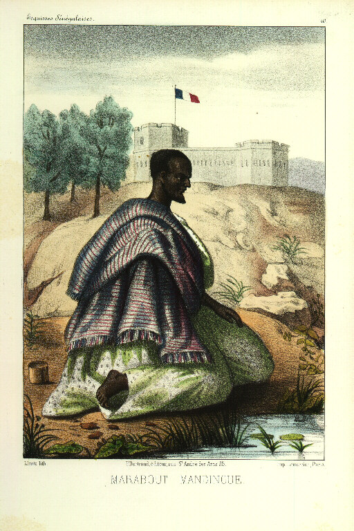 Marabout mandingue faisant son salam au pied du fort de Lamsar (Sénégal). Planche X des Esquisses sénégalaises de l'abbé Boilat (aquarelle)